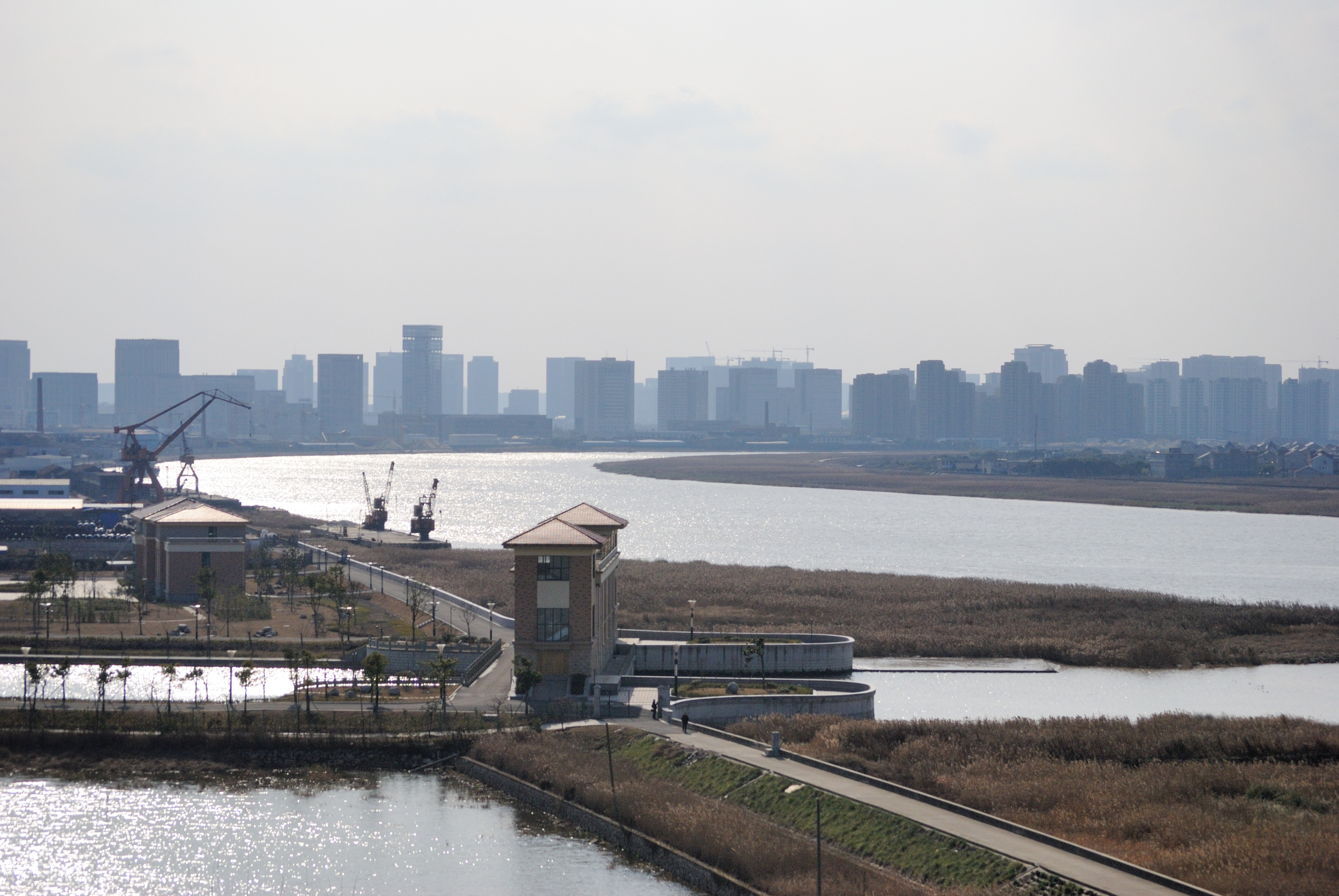 甬江堤防和水闸，摄于明州大桥